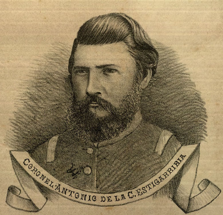 Coronel Antonio de la C. Estigarribia.